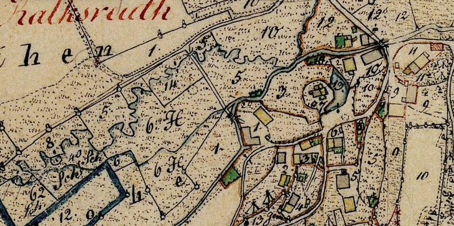 Kalchsreuth auf dem Urkastaster von Bayern